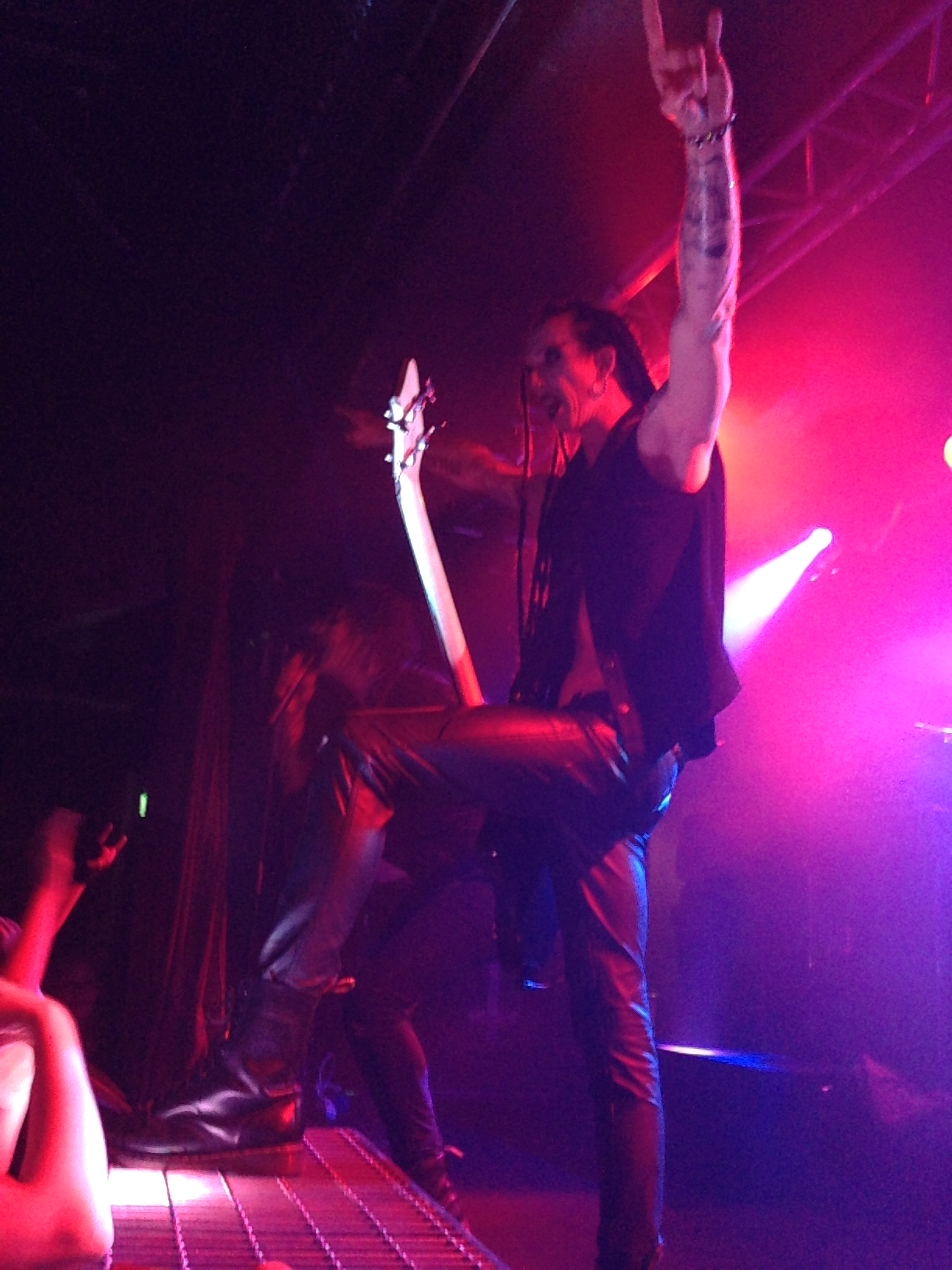 Jonas Kangur alias Skinny Disco Debaser Strand Stockholm 4 October 2014 - 2